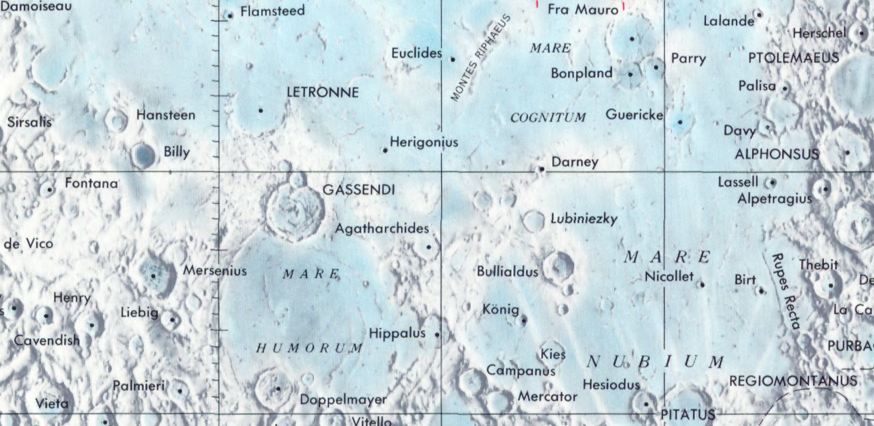 Cráter lunar . Localización de Agatharchides. (Lunar Chart LPC1. Second Edition)